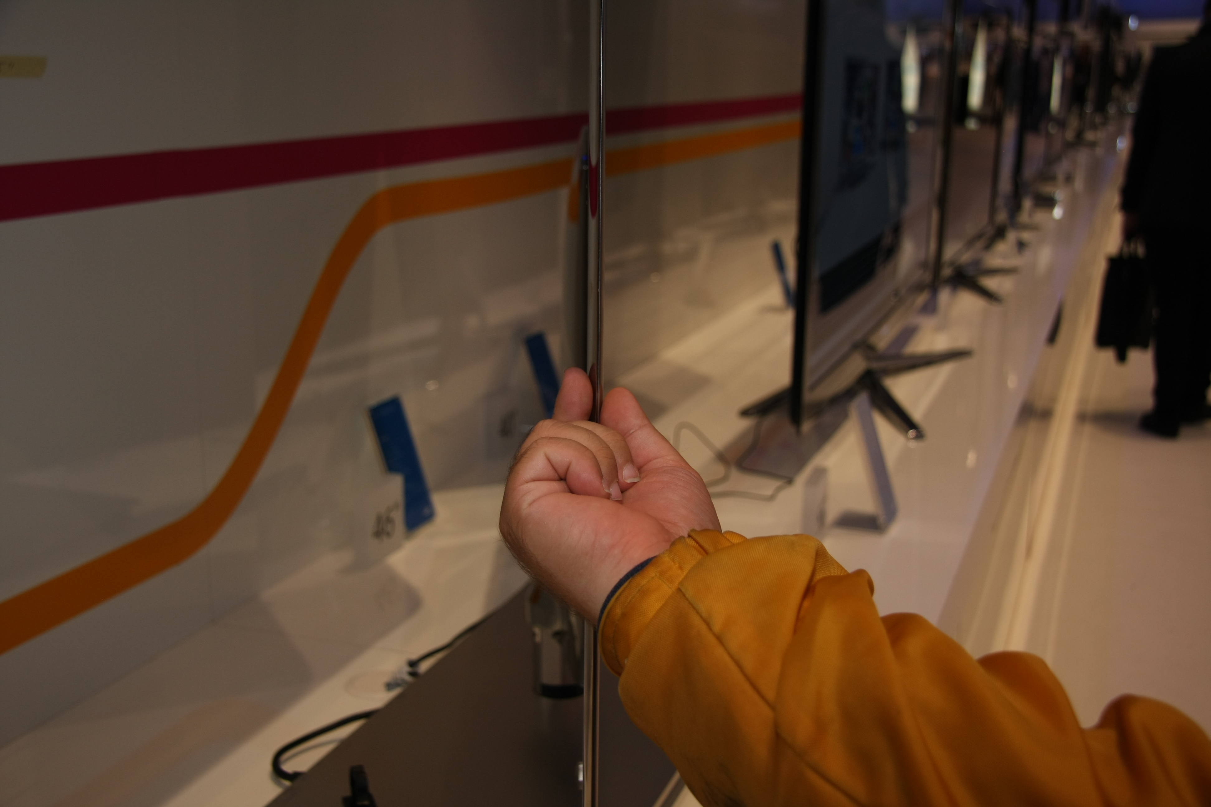 Extrem flache Bauweise eines LCD-Fernsehers, vorgestellt von Samsung auf der IFA 2010 in Berlin.